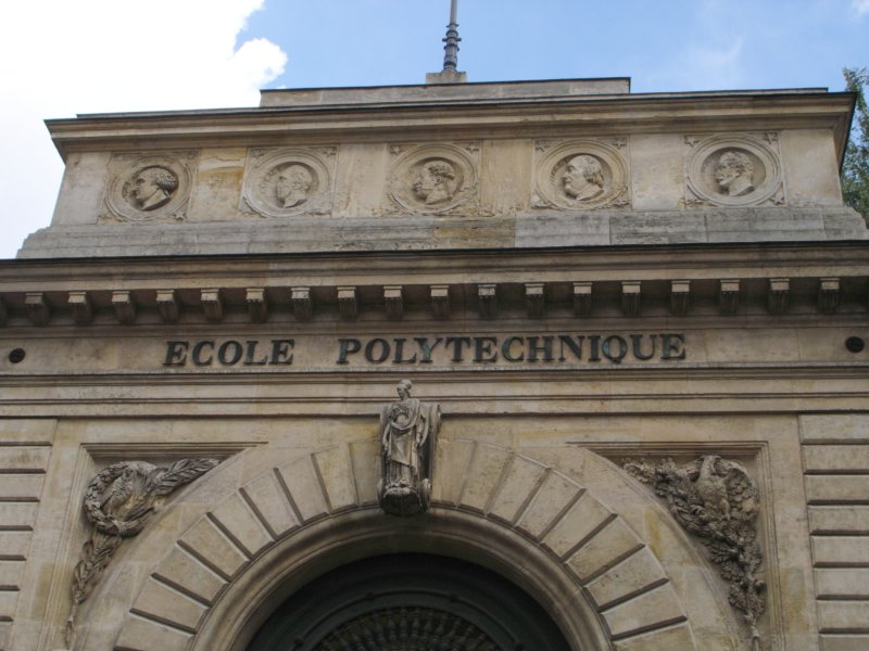 Fronton des bâtiments historiques de l'École polytechnique, rue de l'École polytechnique, Ve arrondissement (Paris)